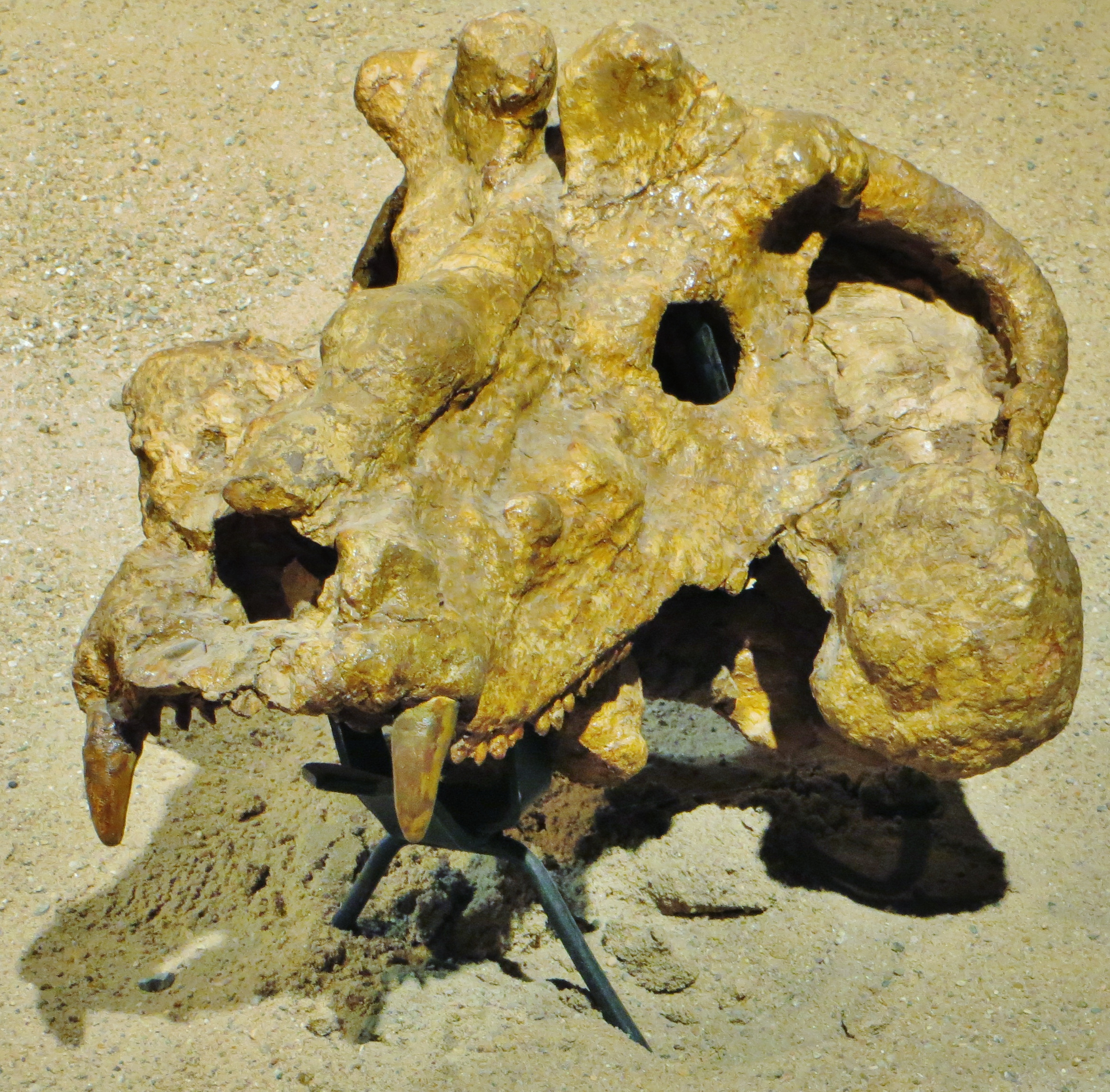 Fossil of Estemmenosuchus, an extinct therapsid- Took the picture at Dinosaurium, Prague